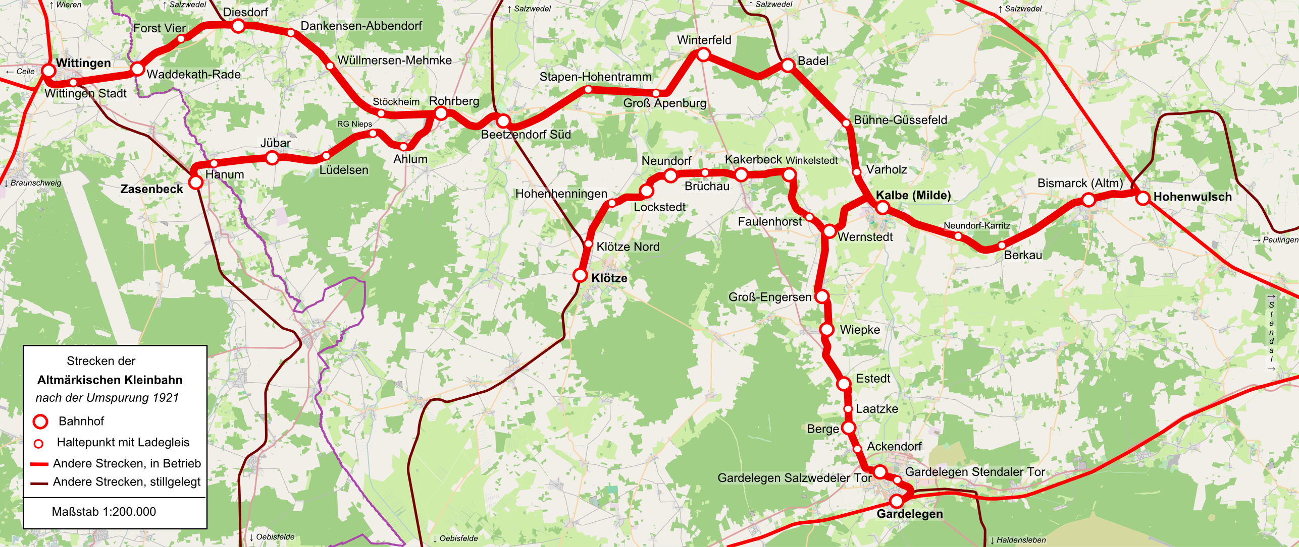 Das Streckennetz der Altmärkischen Kleinbahn nach der Umspurung auf Regelspur im Jahre 1921.